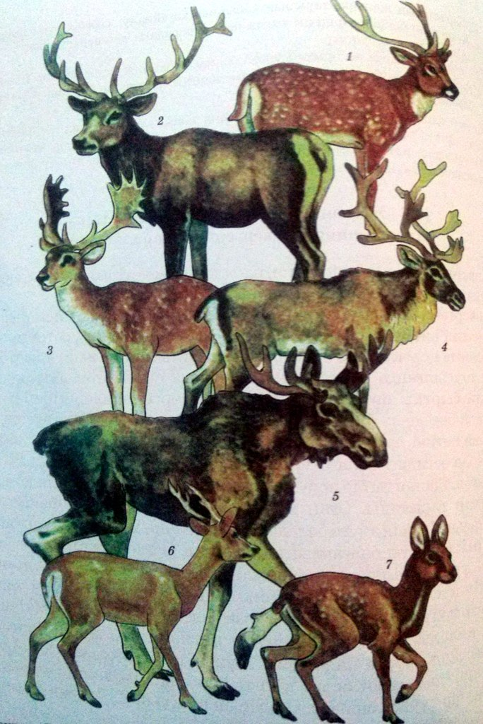 Дивергенция нәтижесінде пайда болған бұғылардың көптүрлілігі: 1-теңбіл бұғы; 2-бұғы (марал); 3-кербұғы; 4-солтүстік бұғысы; 5-бұлан; 6-елік; 7-құдыр